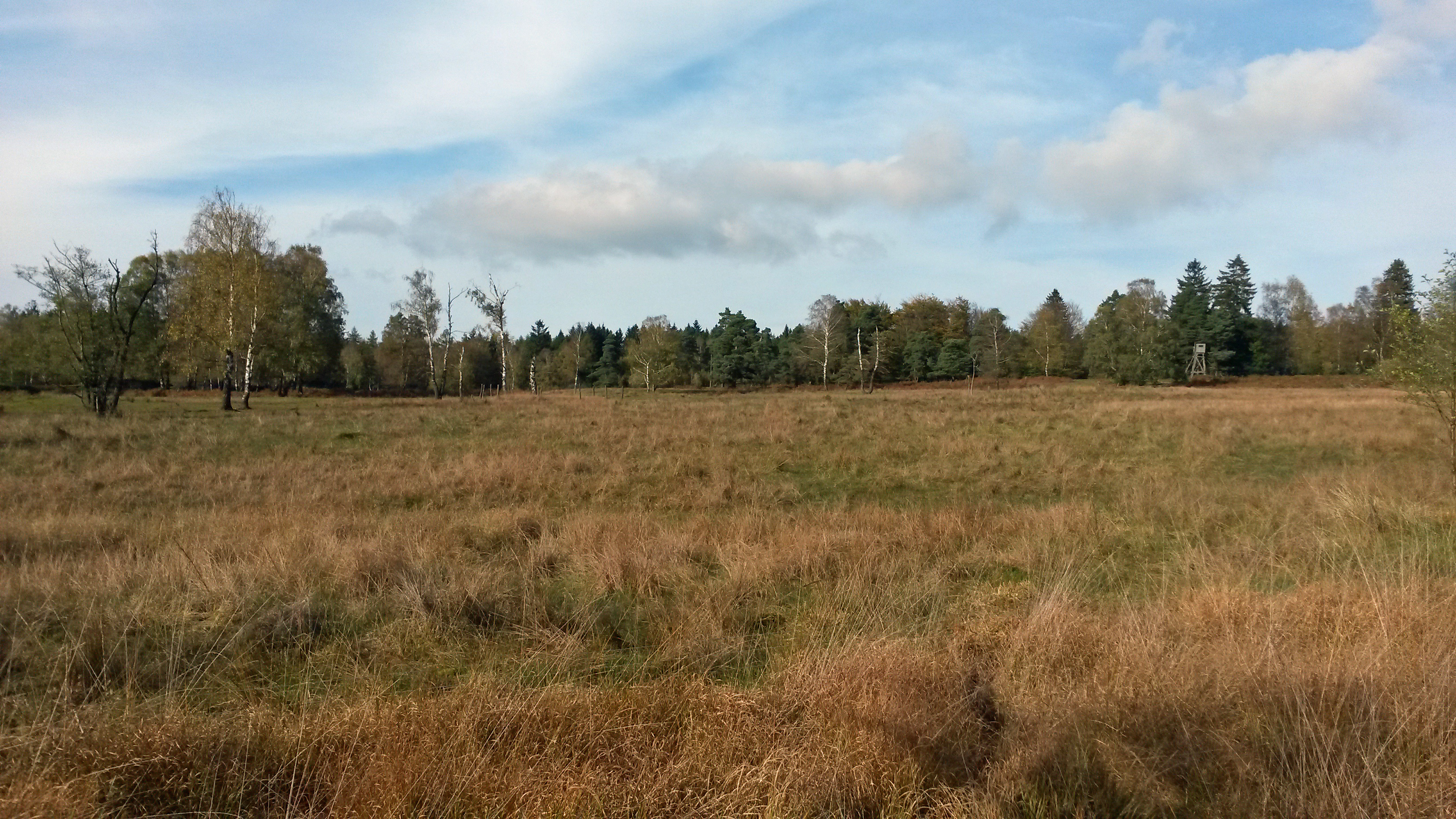 Blick vom Bohlweg im Hühnerfeld nach Nordost.